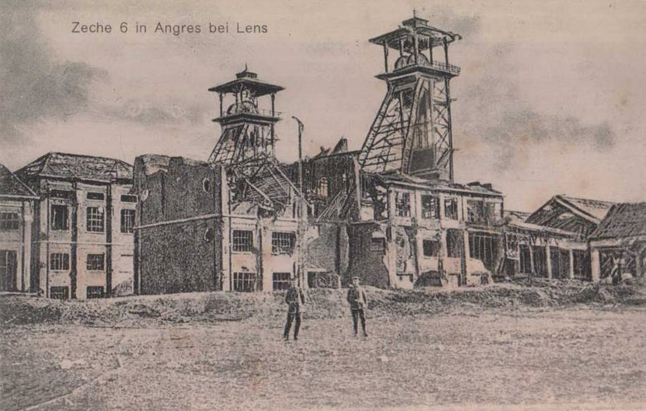 La Fosse n° 6 - 6 bis de la Compagnie des mines de Liévin était un charbonnage constitué de deux puits situé à Angres, Pas-de-Calais, Nord-Pas-de-Calais, France.